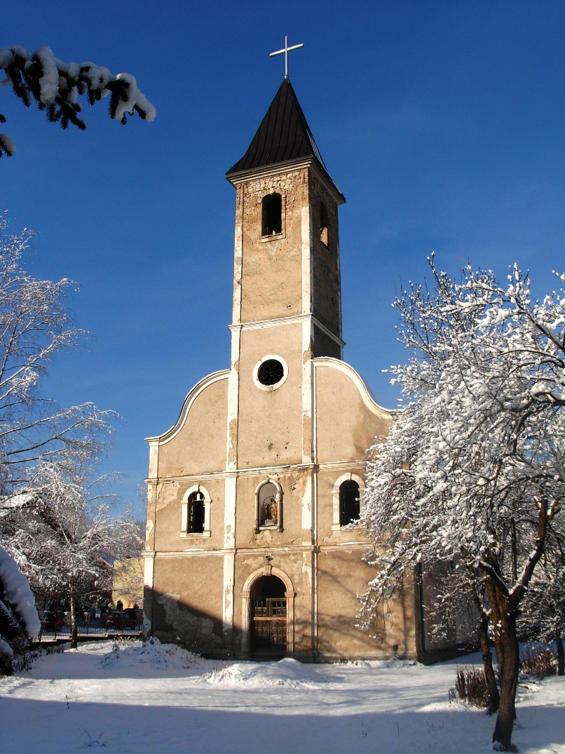 Katolička crkva u Mrkonjić Gradu